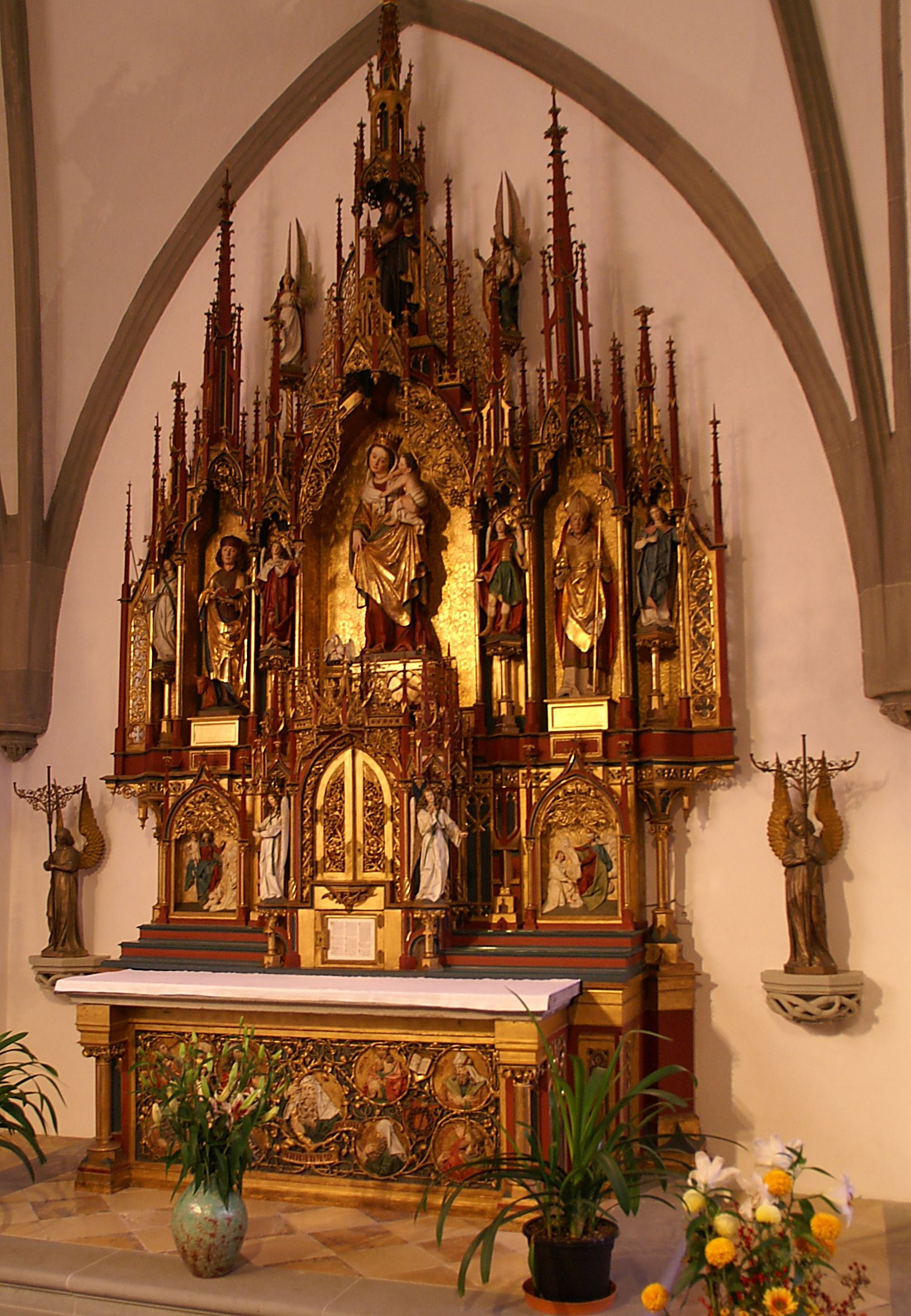 Seitenaltar im gotischen Stil. Dom St.Nikolaus in Feldkirch, Vorarlberg